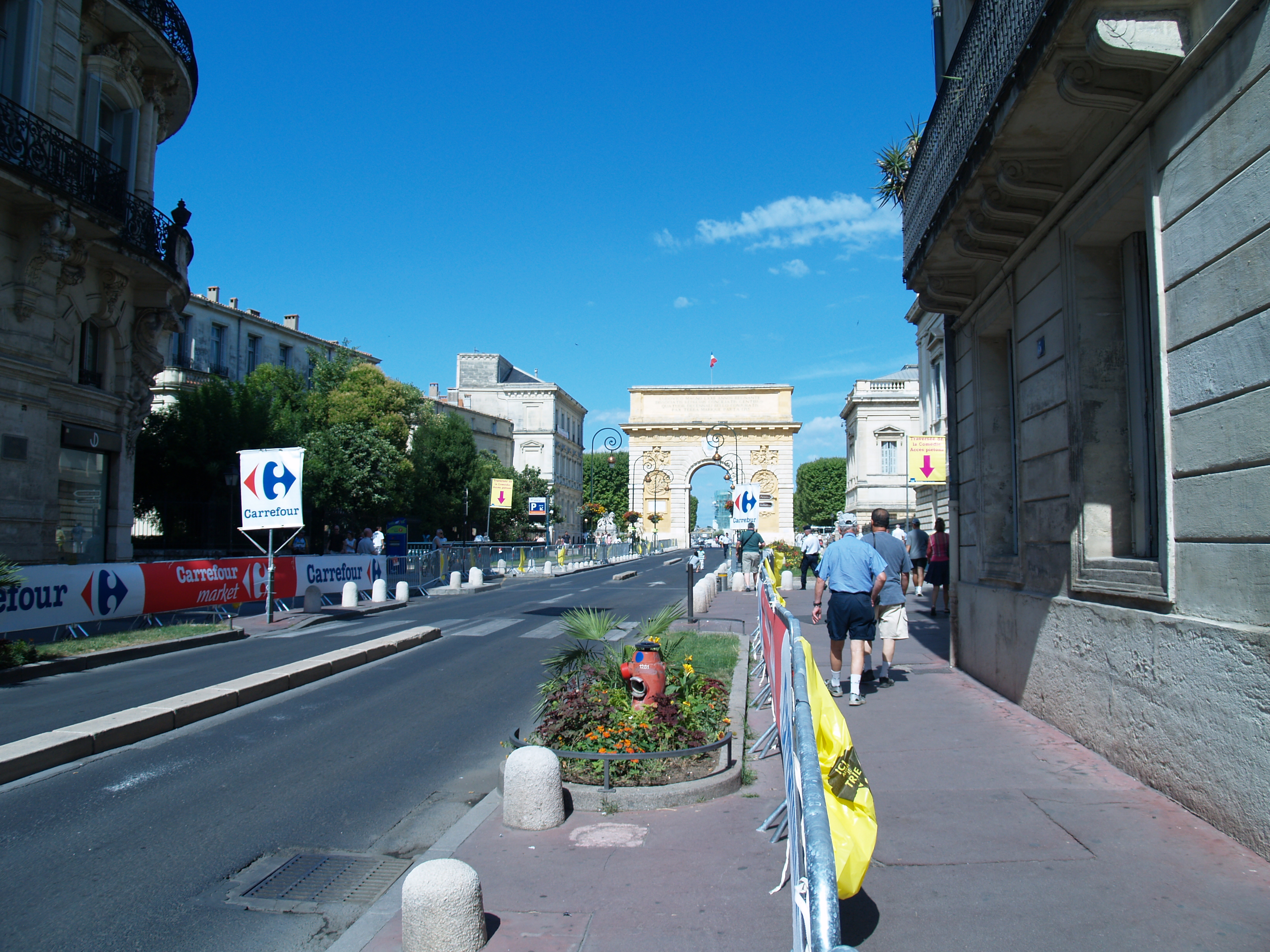 Rue Foch le matin du tour de France 2009.